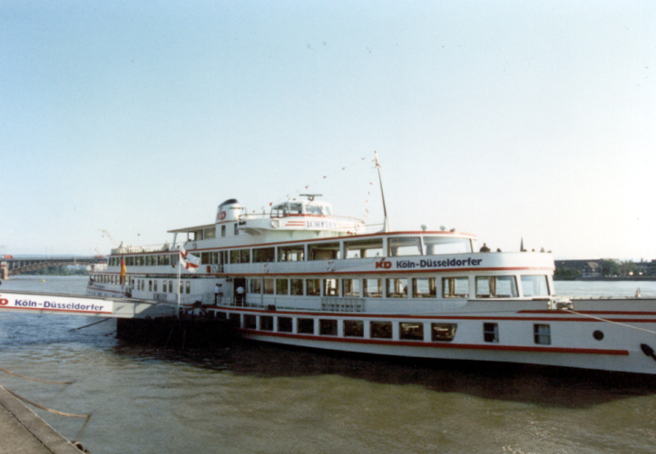 Loreley (III) der Köln-Düsseldorfer in Mainz. Das Schiff wurde 1999 zum Restaurantschiff umgebaut. 2002 ist das Schiff bei einen Werftaufenthalt gesunken und wurde 2003 verschrottet.